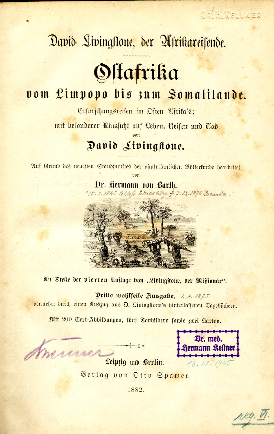 David Livingstone. "Ostafrika vom Limpopo bis zum Somalilande". Leipzig und Berlin 1882